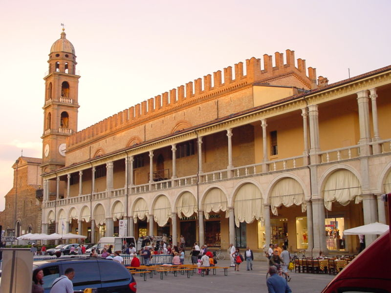 Faenza (province of Ravenna, Emilia-Romagna, Italy), Piazza del Popolo